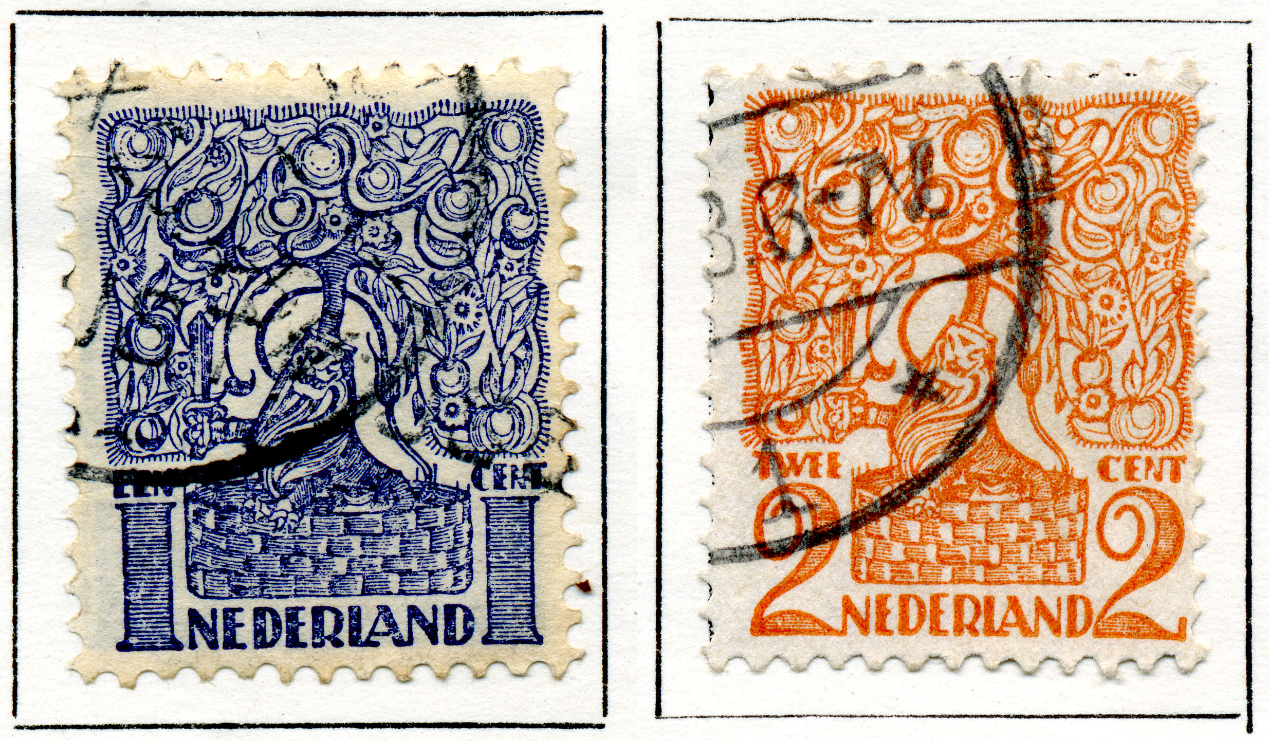 De Leeuw in de Hollandse tuin 1 en 2 cent (1923) (NVPH nr 110 en 111). Ontworpen door Michel de Klerk